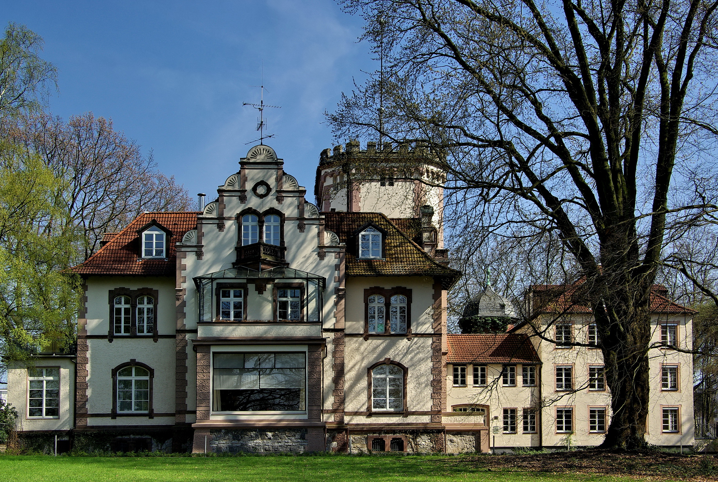 Haus Morp bei Erkrath, Ansicht vom Park aus.